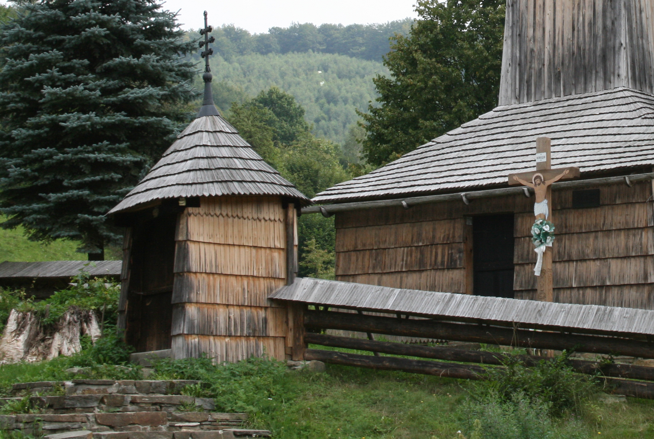 Zvonica cerkvi v Krajnom Čiernom